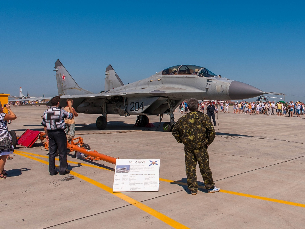 МиГ-29КУБ в Ейске на авиашоу, перед выруливанием.